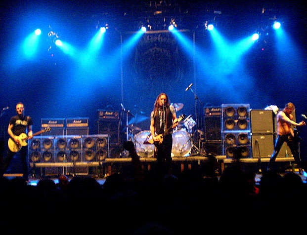 Det här är en manipulerad bild av bandet D-A-D. Den togs under D-A-D:s spelning på Hovet.